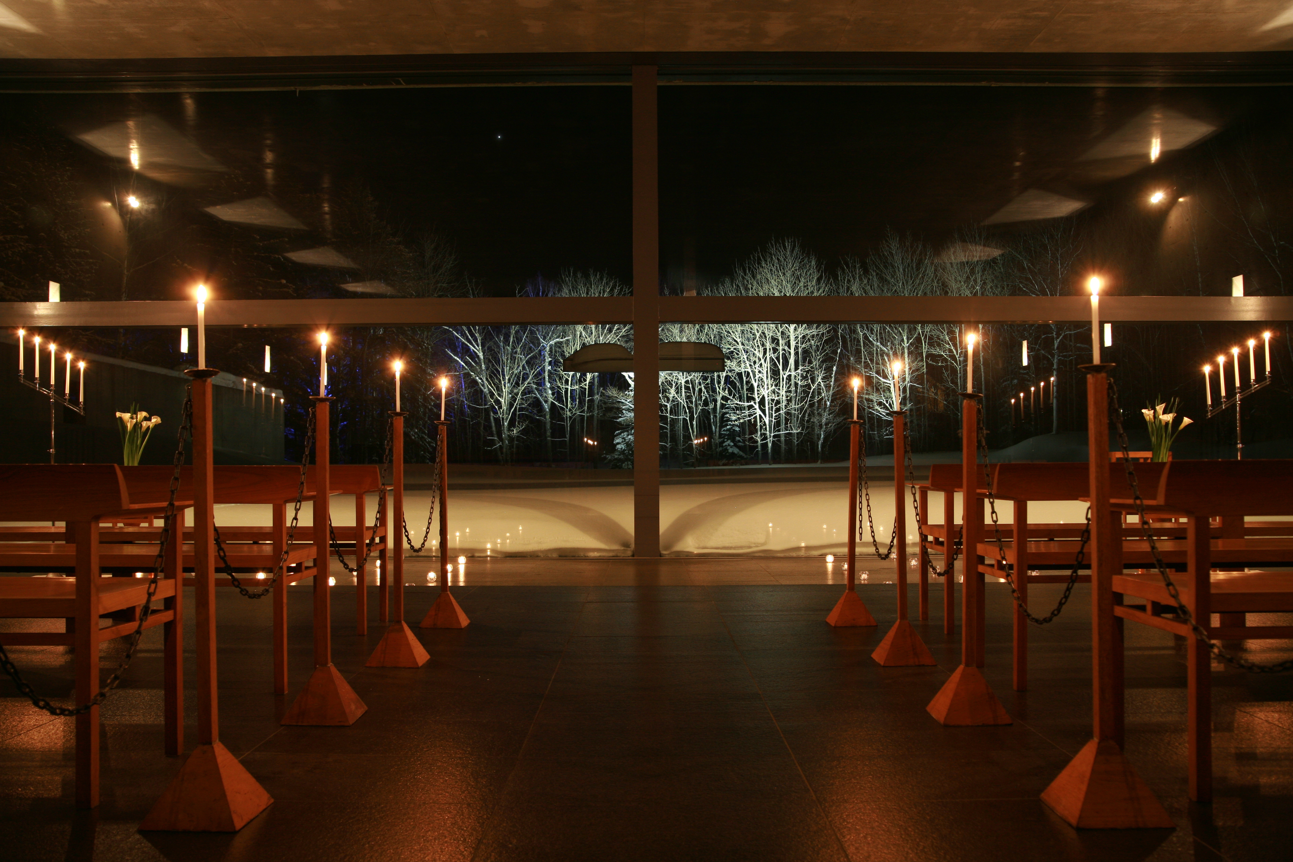 水の教会